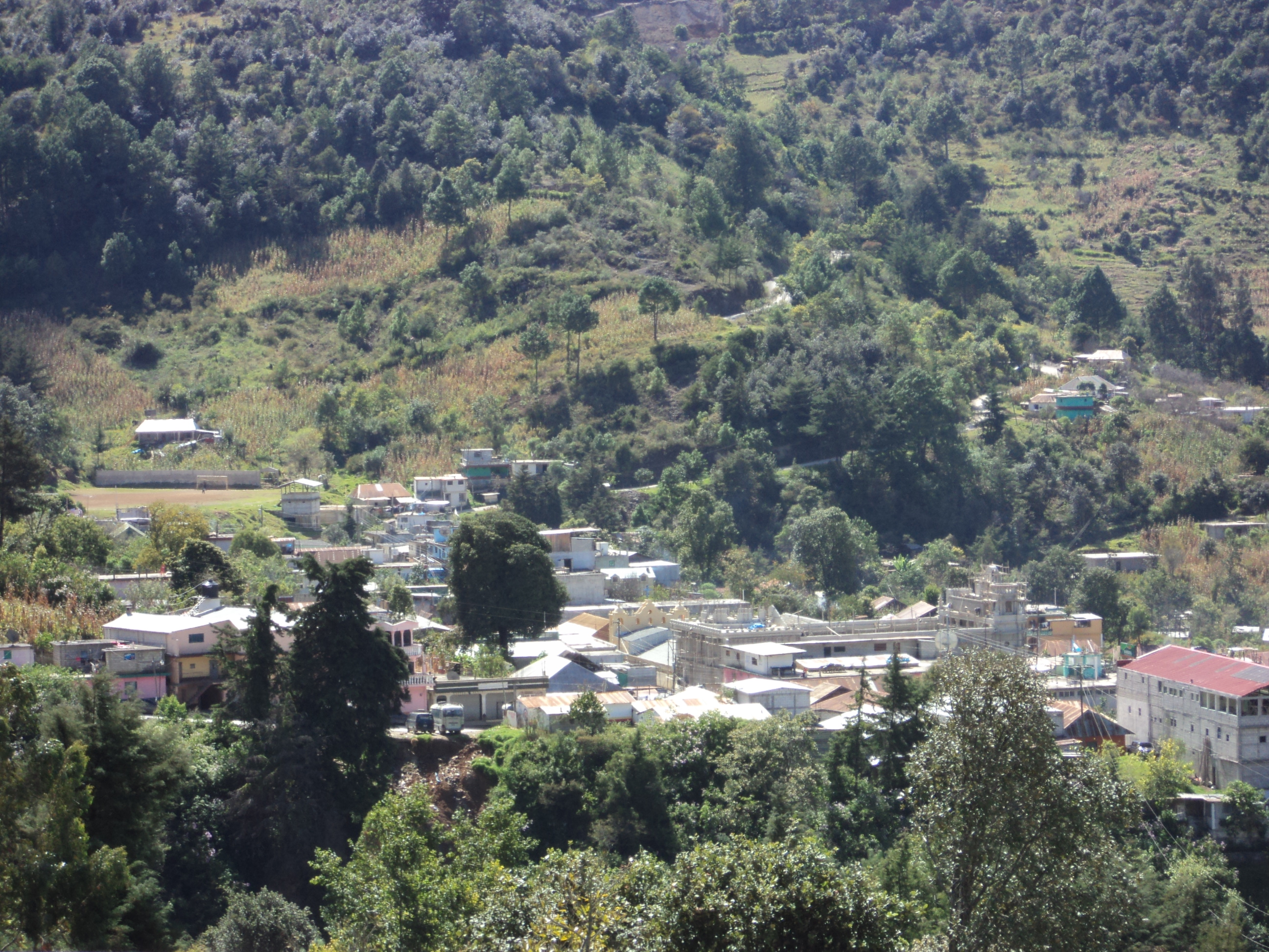 Cabecera municipal de San Sebastián Coatán